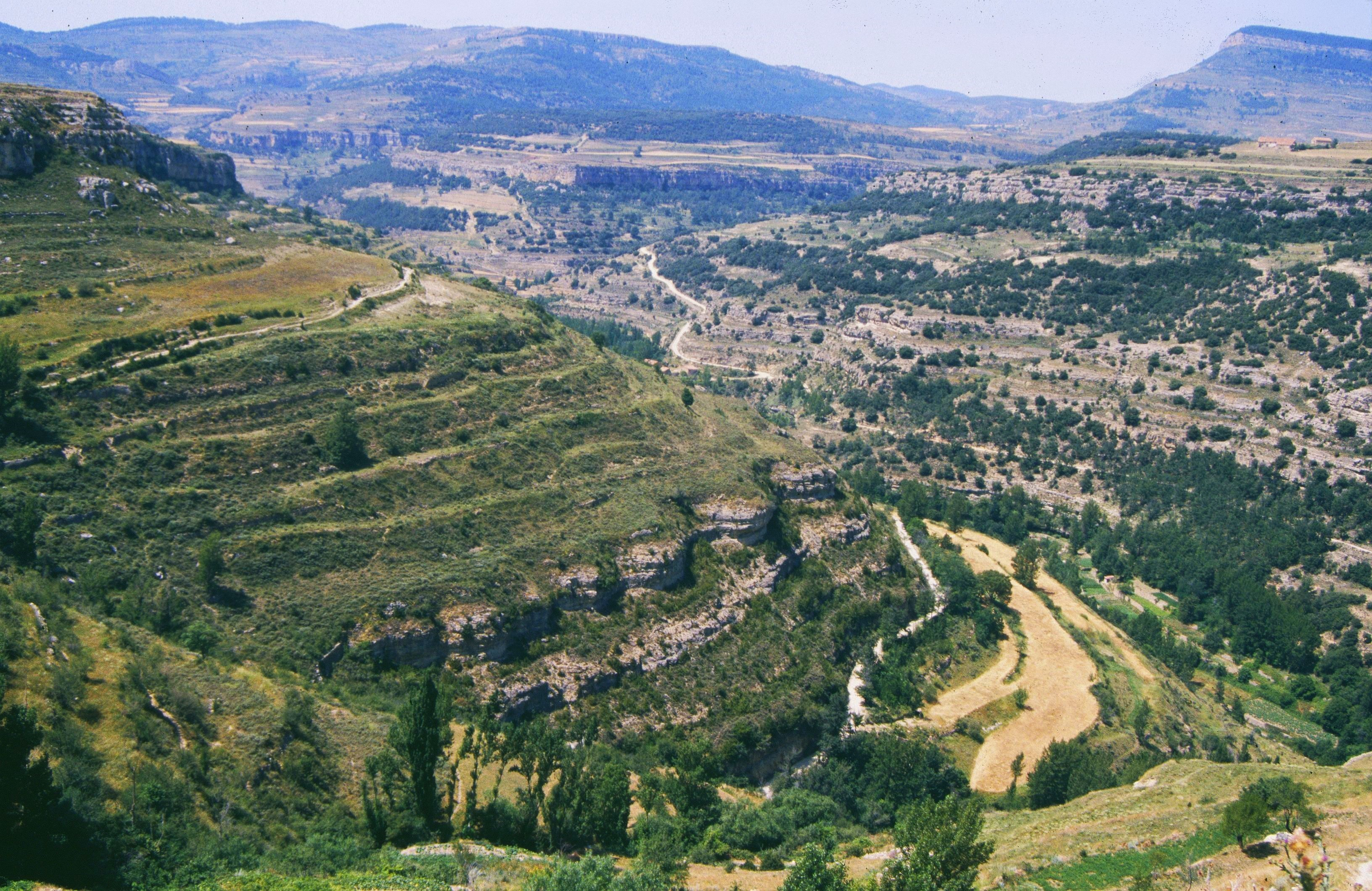 El Maestrazgo